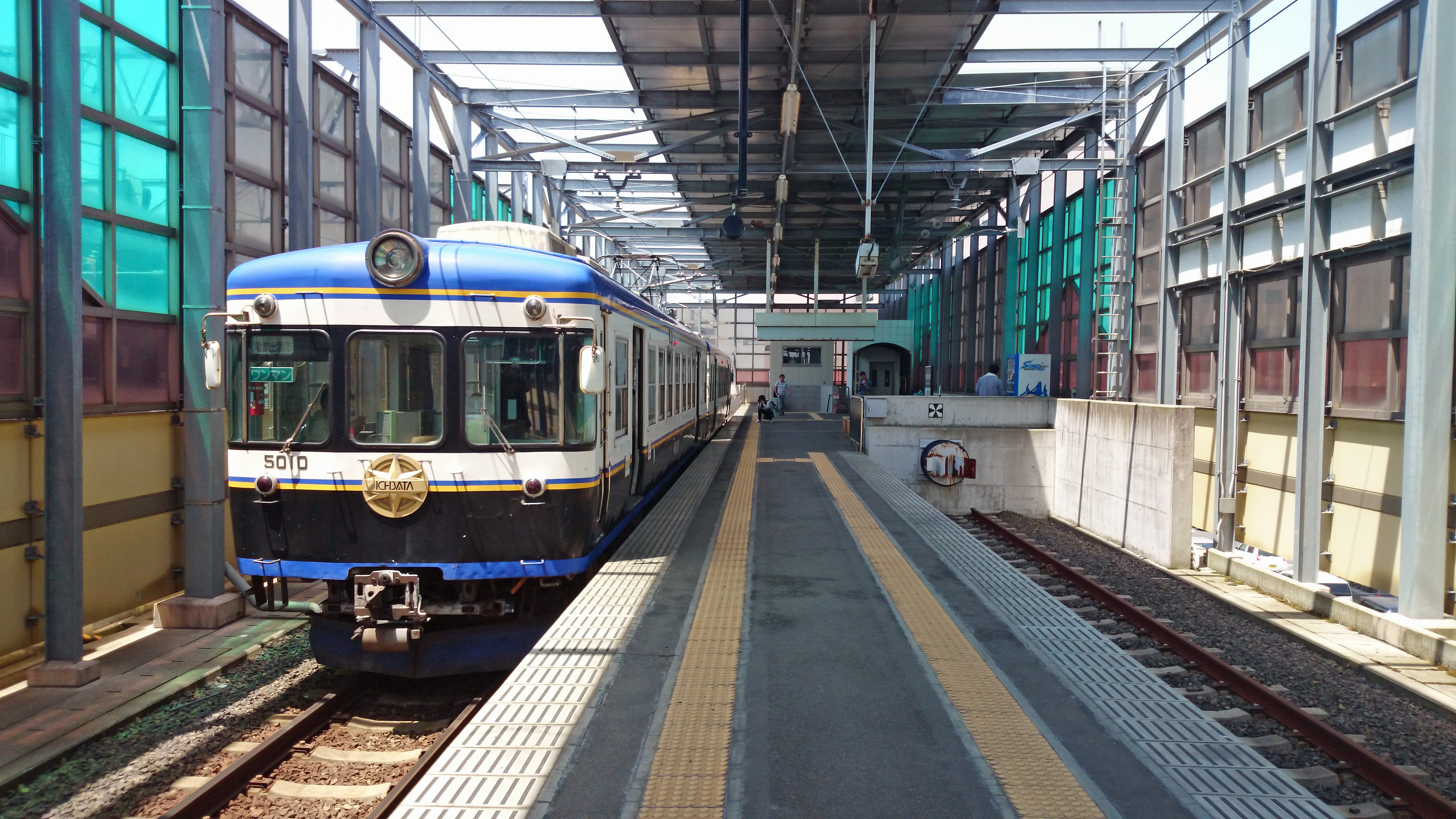 電鉄出雲市駅ホーム